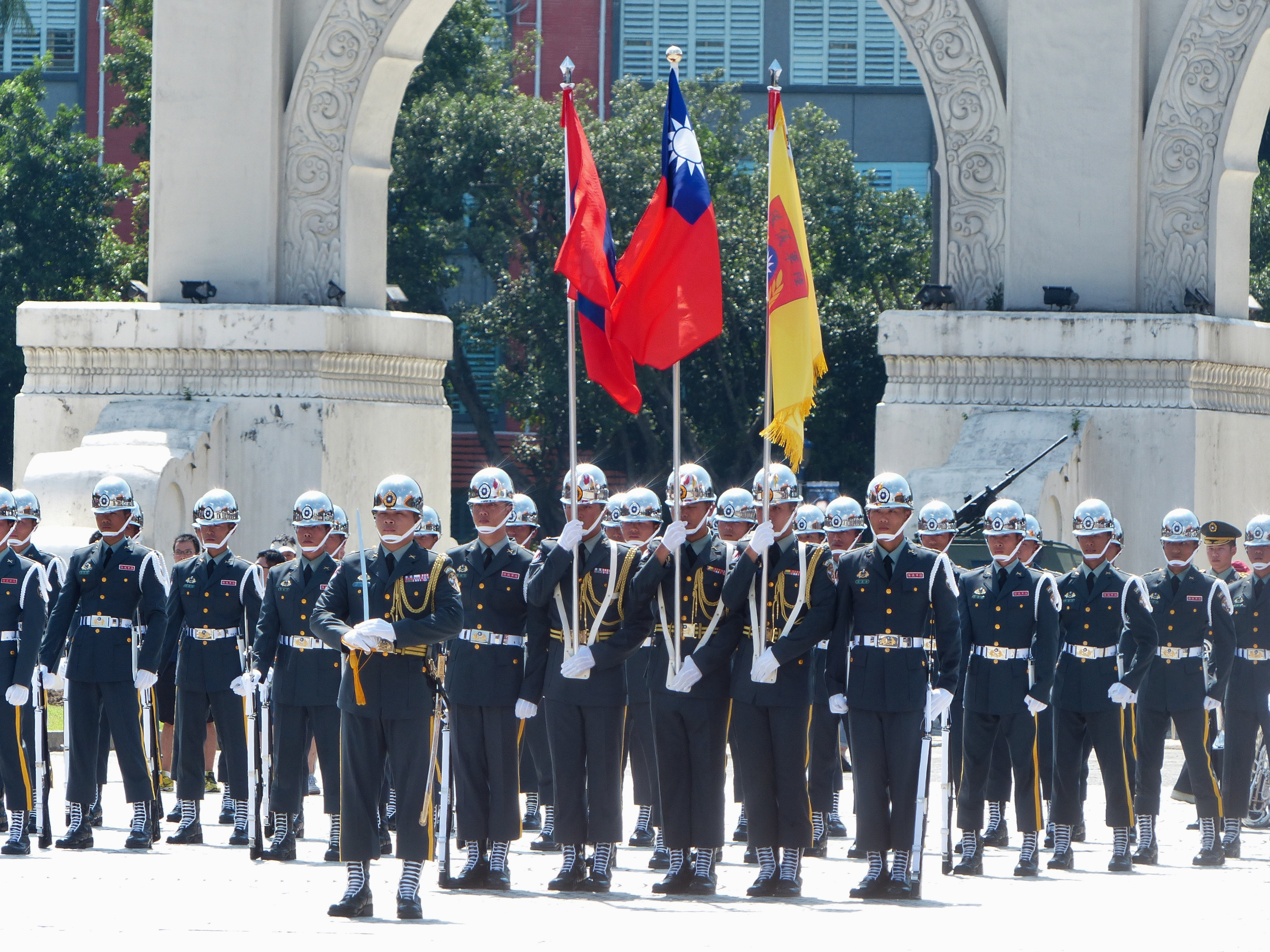 特戰部隊體驗展6月8日下午，中正紀念堂廣場西端操演前的陸軍儀隊。